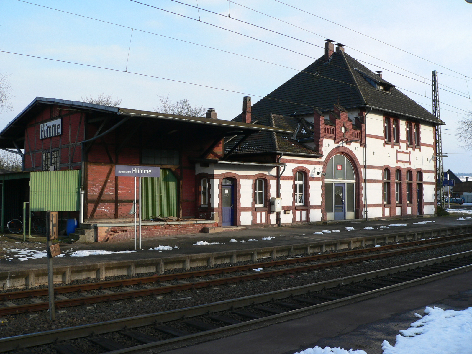 Bahnhof Hümme, Ausgangsbahnhof der ehemaligen Carlsbahn Fotograf: selbst fotografiert Datum: 12.02.2006